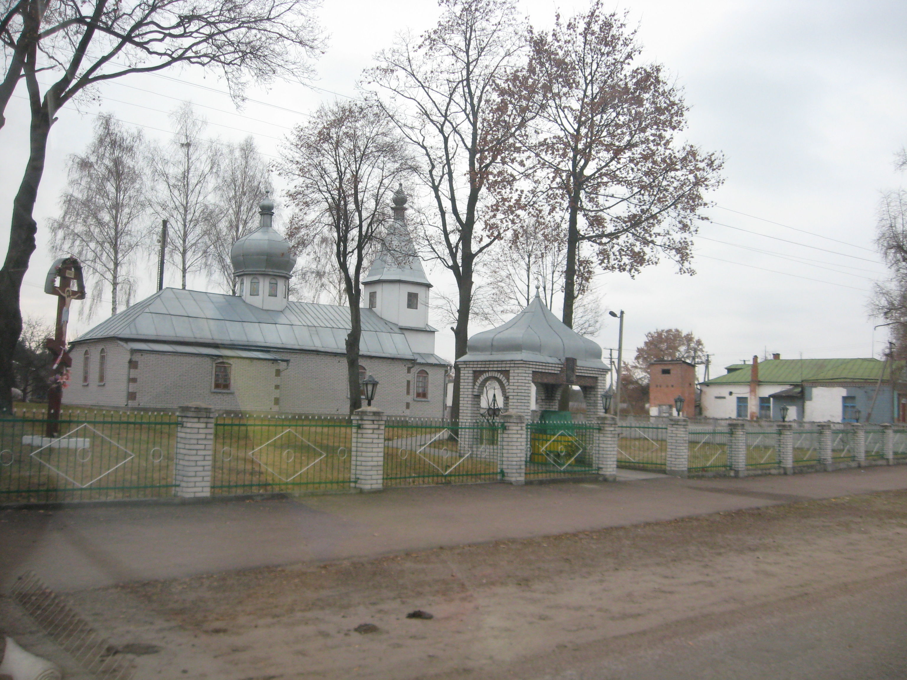 Церква у с. Ушомир